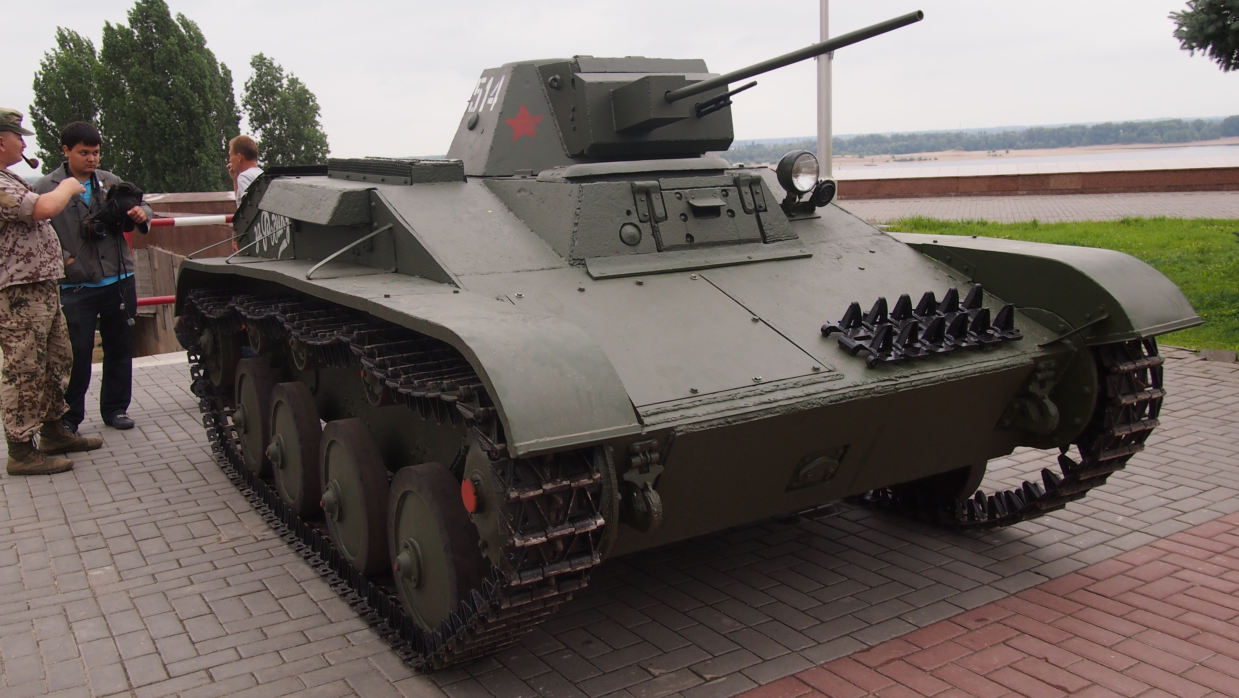 Танк Т-60 производства завода № 264 НКСП (тогда г. Красноармейск), подбитый у хутора Киселёв Кагановичского района Сталинградской области (ныне Суровикинский Волгоградской) зимой 1942 в ходе Сталинградской битвы в экспозиции одноимённого музея-заповедника